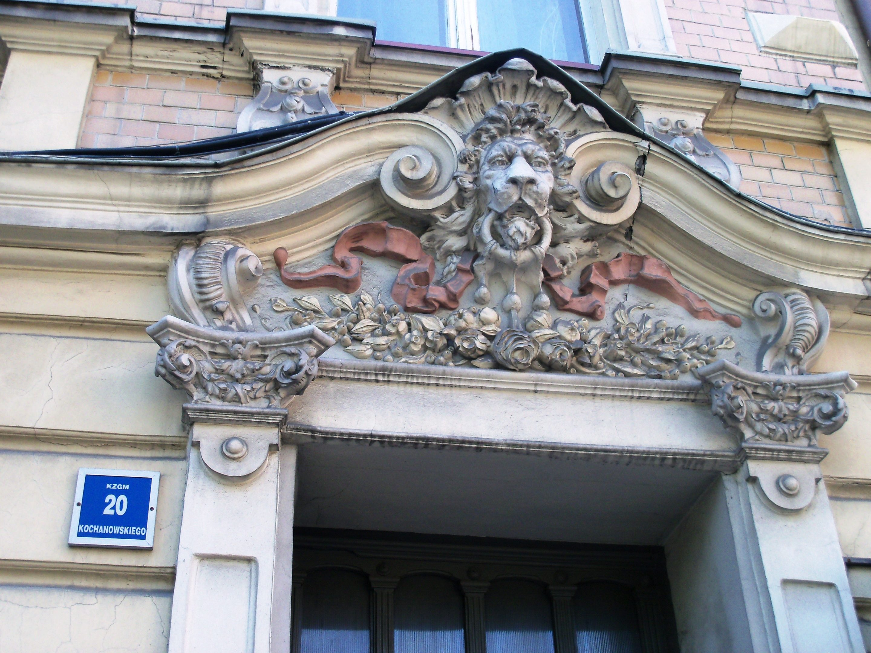 Detal architektoniczny na fasadzie budynku przy ul. Jana Kochanowskiego 20 w Katowicach